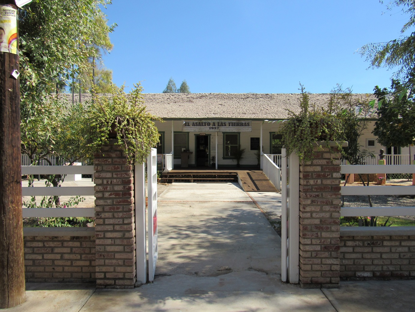 El museo del asalto a las tierras se encuentra al centro de Michoacán de Ocampo, municipio de Mexicali, Baja California